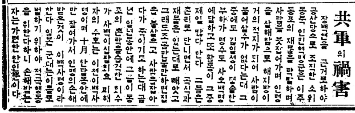 김일성 부대의 비적(匪賊) 행위를 보도한 『한민(韓民)』 제9호, 1936년 11월 30일자 기사 : "공군(共軍)의 화해(禍害) 장백현을 근거로 하여 공산당으로 조직한 소위 동북 인민혁명군은 이주 동포의 재물을 약탈하며 사람을 붙잡아가며 인명을 살해함으로 해 지방이 거의 적지가 되어 사람이 붙어 살수가 없다는데 그중에도 김일성이 영솔한 부하가 명수도 사오백 명에 달하고 또 활동이 그중 제일 많다 한다. 그들은 촌리로 다니면서 곡식과 재물은 있는 대로 빼앗고 그래도 조금만 불만하면 집을 불사르고 사람을 잡아다가 죽이기도 하는데 금년 일년 동안에 그들이 동포의 촌락을 습격한 회수가 사백이십팔회요 피해자의 수효는 이천이백사 명이며 十月 한달 동안에만 잡혀가서 인명의 손해 받은 것이 이백사 명이라 한다. 일본 군대는 이를 토벌하기 위하여 적극 행동을 취한다 하니 손해 받는 자는 가련한 한인뿐이다." 『한민(韓民)』은 대한민국임시정부를 유지 운영하였던 정당 한국국민당의 기관지이다.